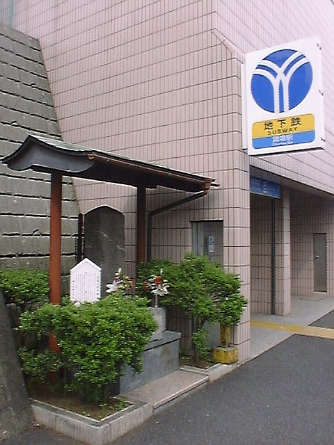 Exit of Odoriba Station, Yokohama Municipal Subway Blue Line, Izumi-ku, Yokohama, Japan